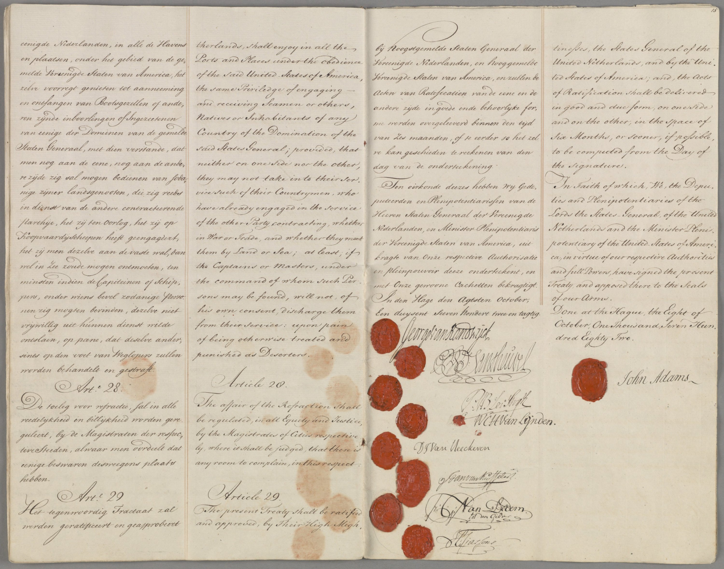 Akte van traktaat van vriendschap en commercie met een separate conventie te 's-Gravenhage gesloten tussen de Staten-Generaal en de Verenigde Staten van Amerika. Met bijlagen, 1780, 1782. 8 oktober 1782